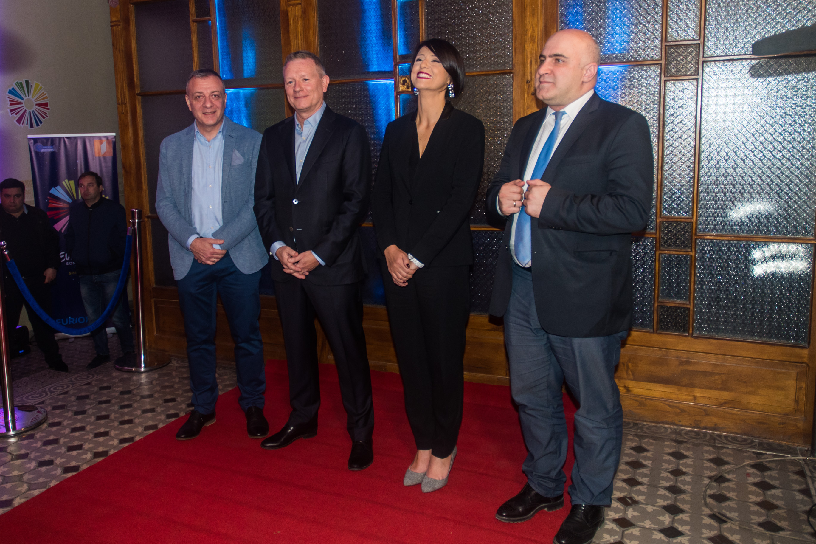 Организаторы Детского Евровидения 2017 на красной ковровой дорожке церемонии открытия конкурса